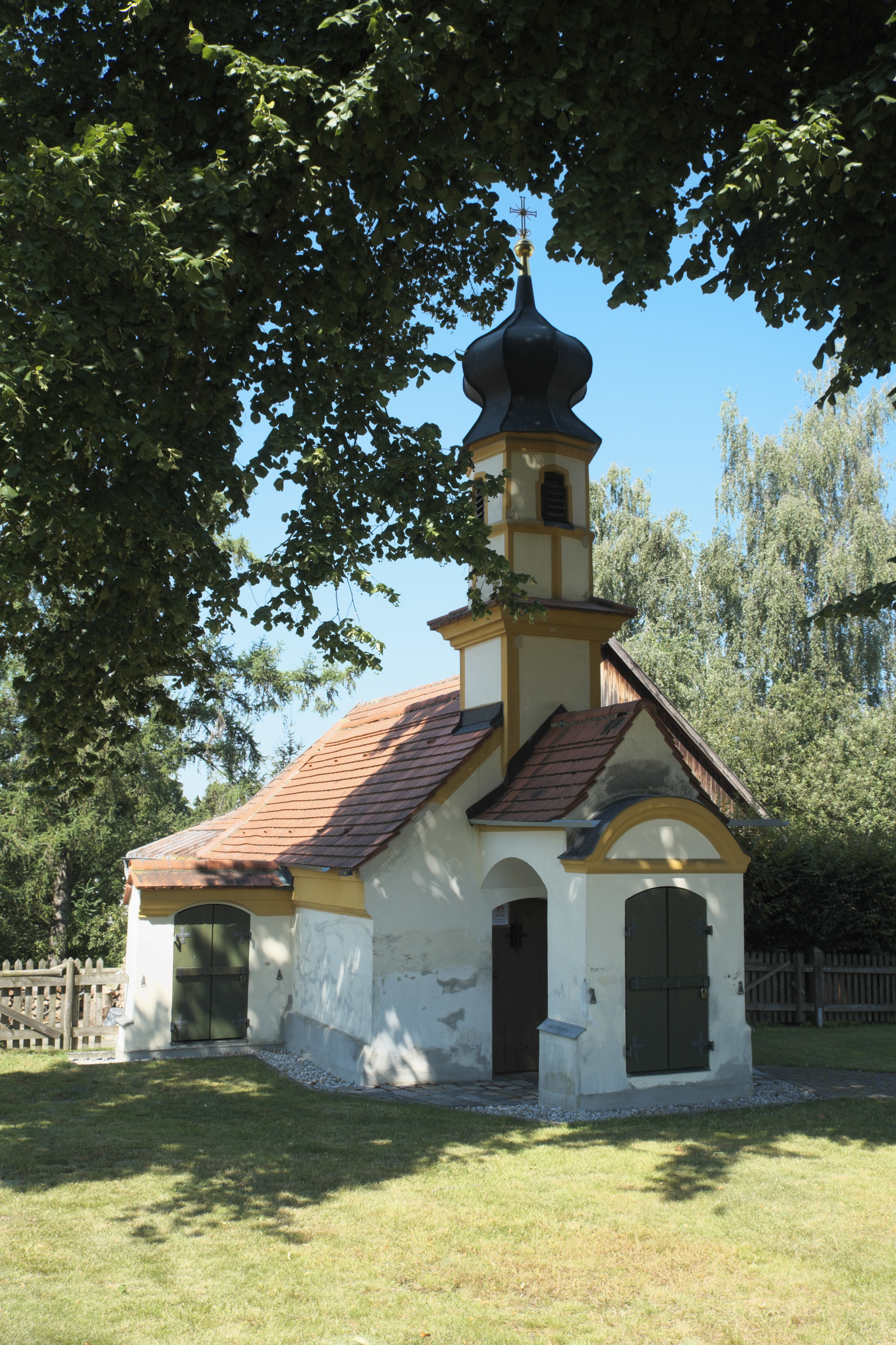 Kalvarienberggruppe in Wenigmünchen (Egenhofen) im oberbayerischen Landkreis Fürstenfeldbruck (Bayern/Deutschland)